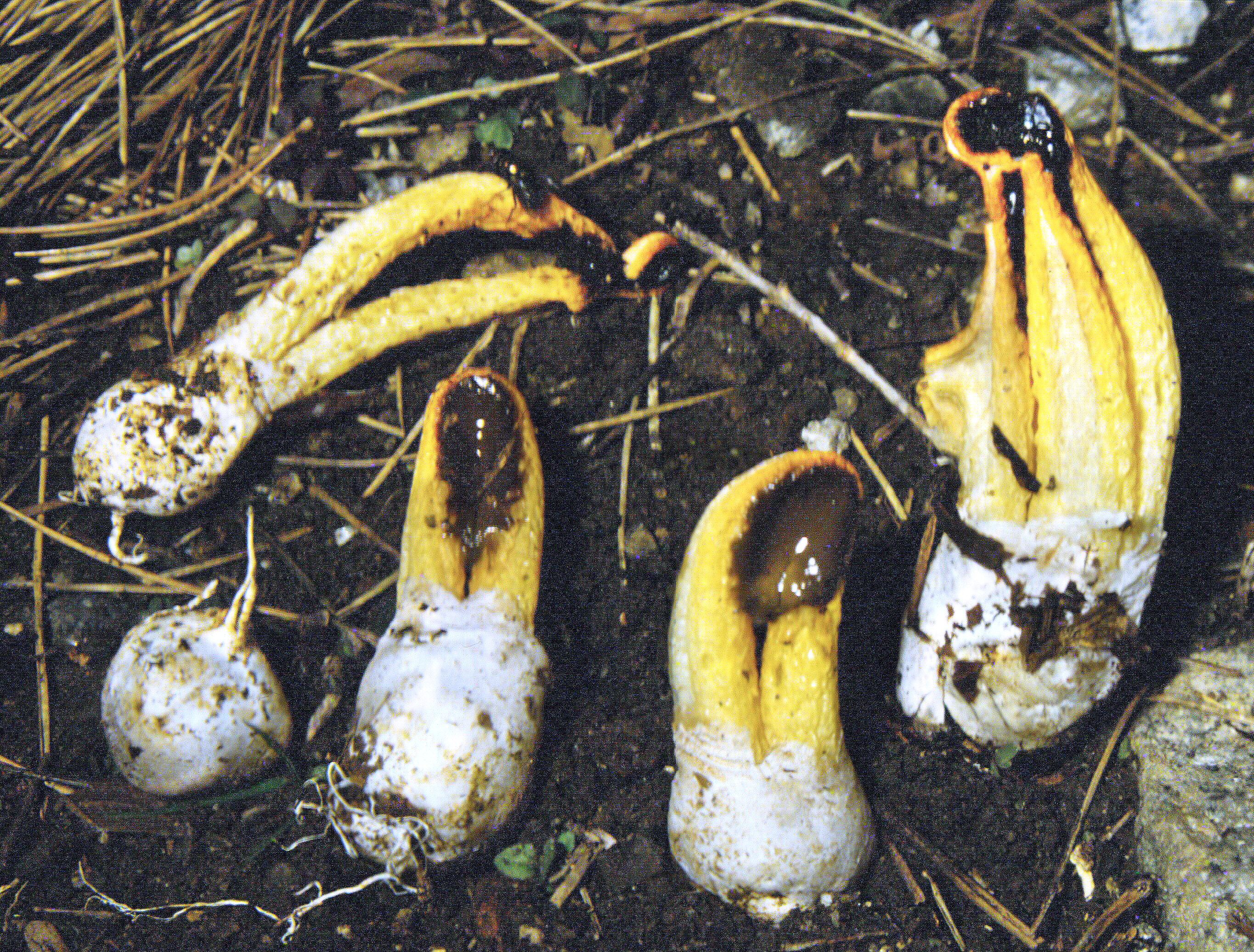 Champignon Gastéromycètes, au stade d'oeuf et 4 adultes en forme de pince de crabe